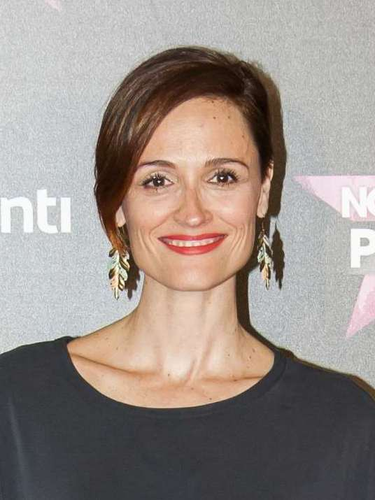 Fotos del photocall y fiesta de lanzamiento de un nuevo canal de televisión en España.